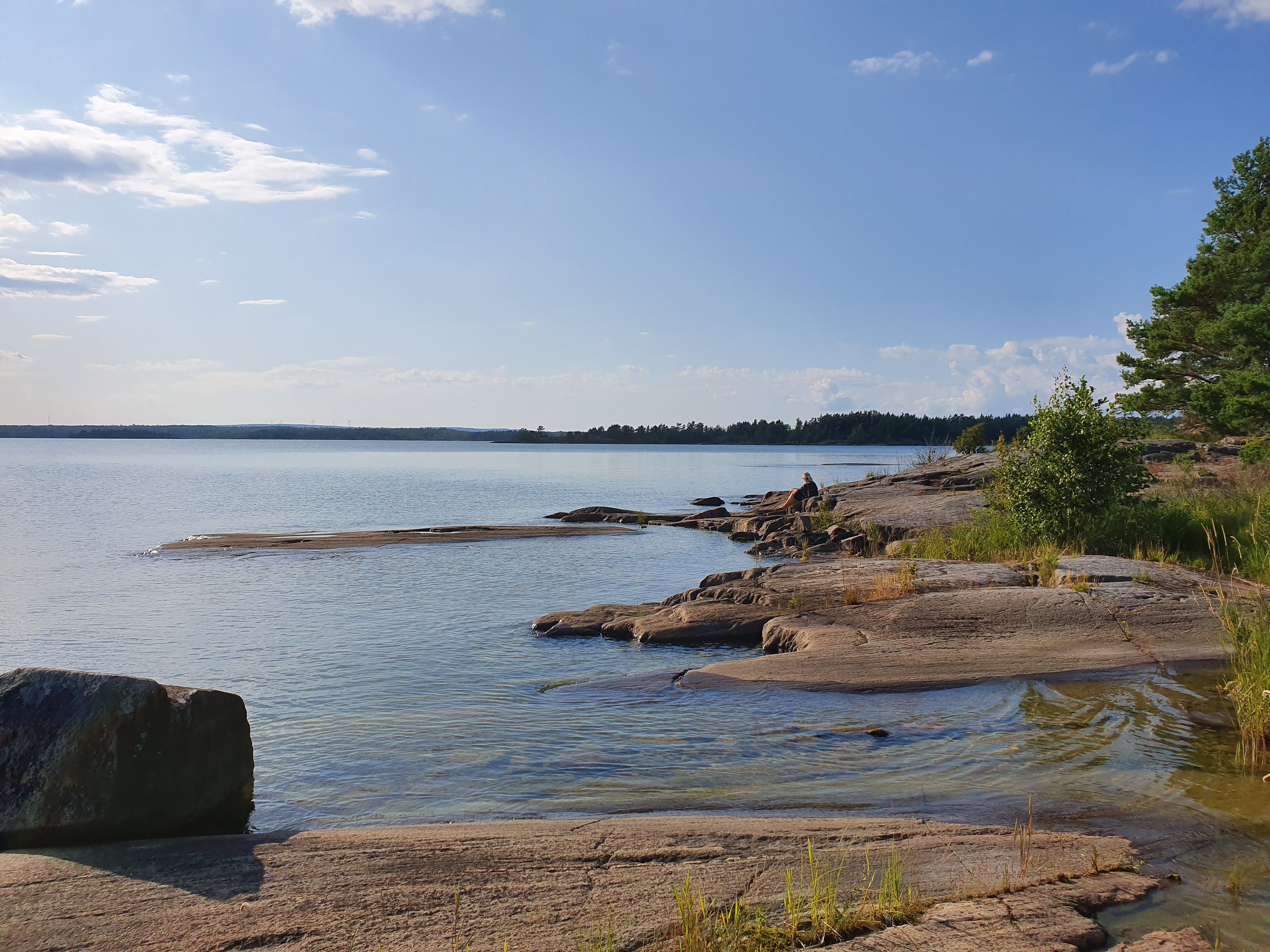 Landskap